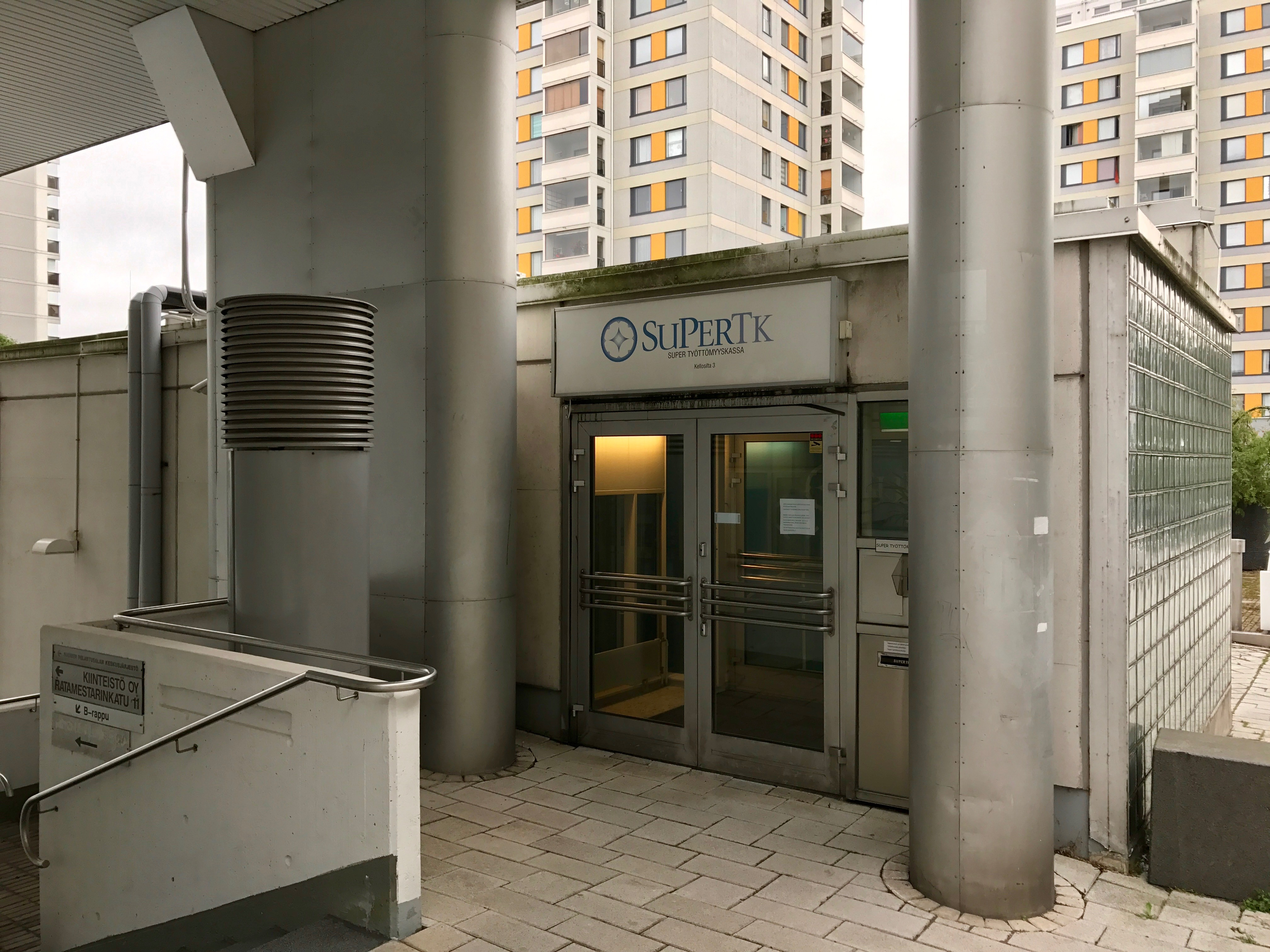 Super työttömyyskassan toimisto Helsingin Itä-Pasilassa, Kellosillantie 3.